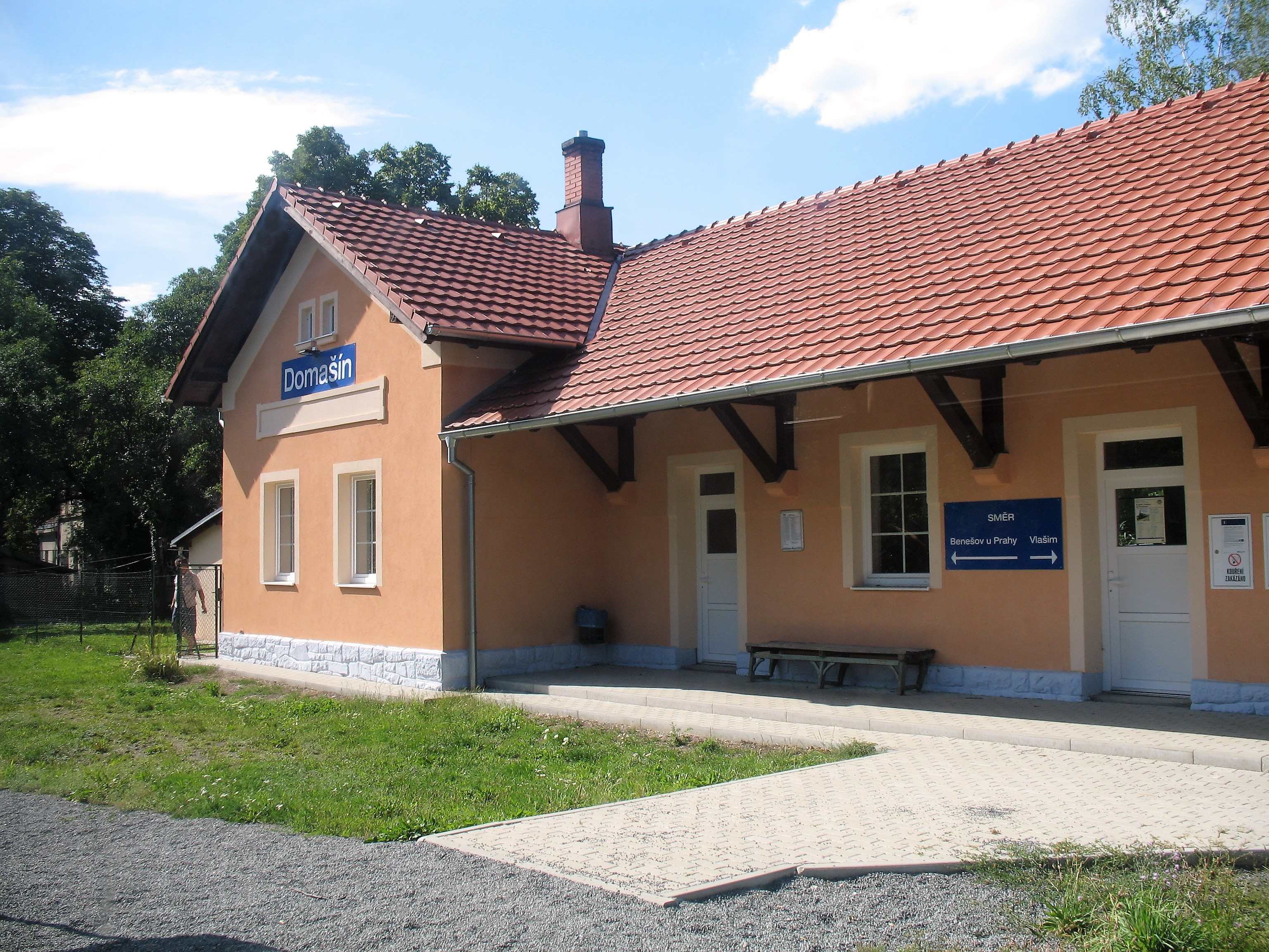 Železniční zastávka Domašín u Vlašimi